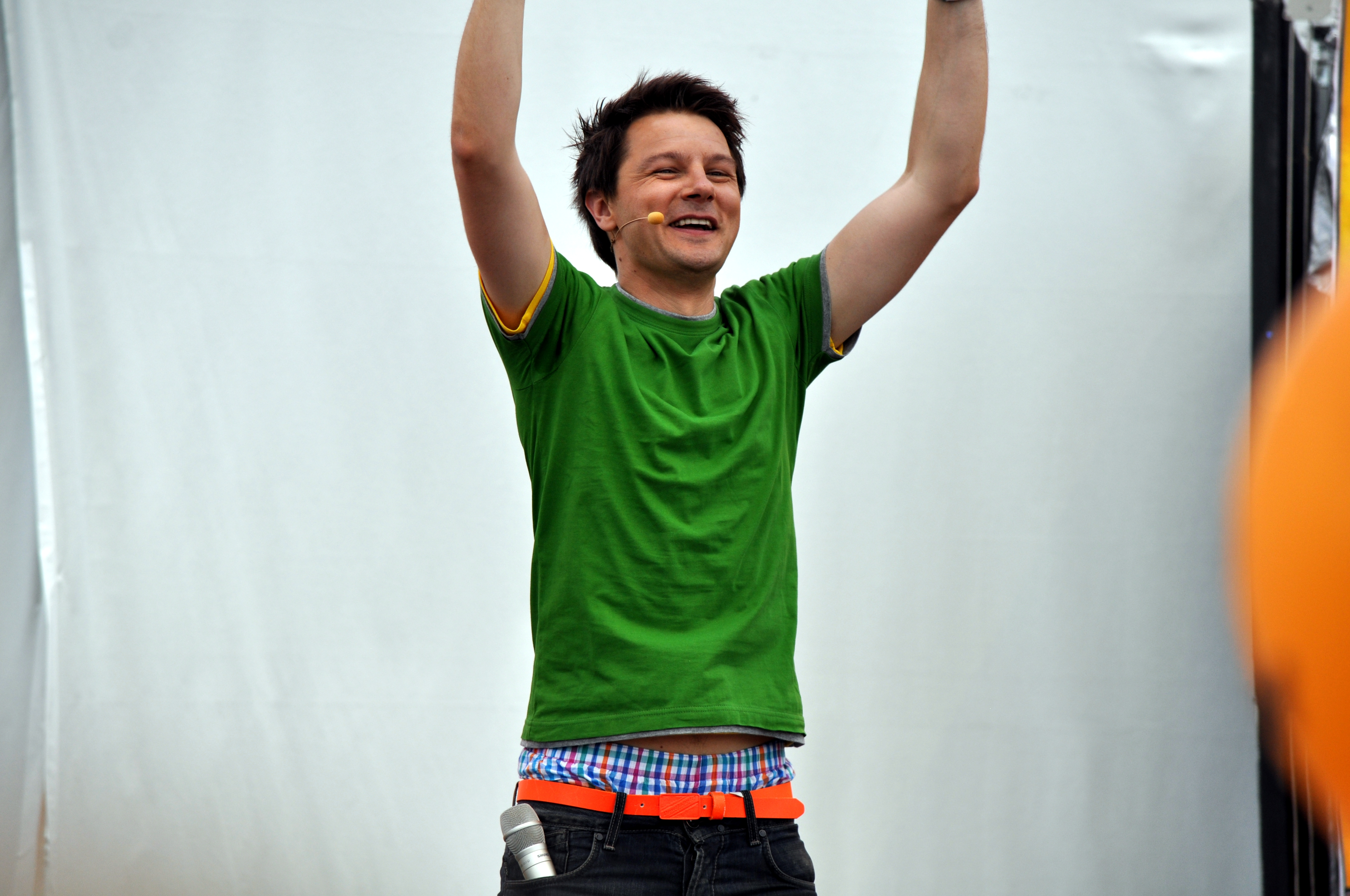 WDR-Moderator André Gatzke auf der Bühne am "Türen auf!"-Tag beim Fraunhofer-Institut für Integrierte Schaltungen in Erlangen-Tennenlohe.